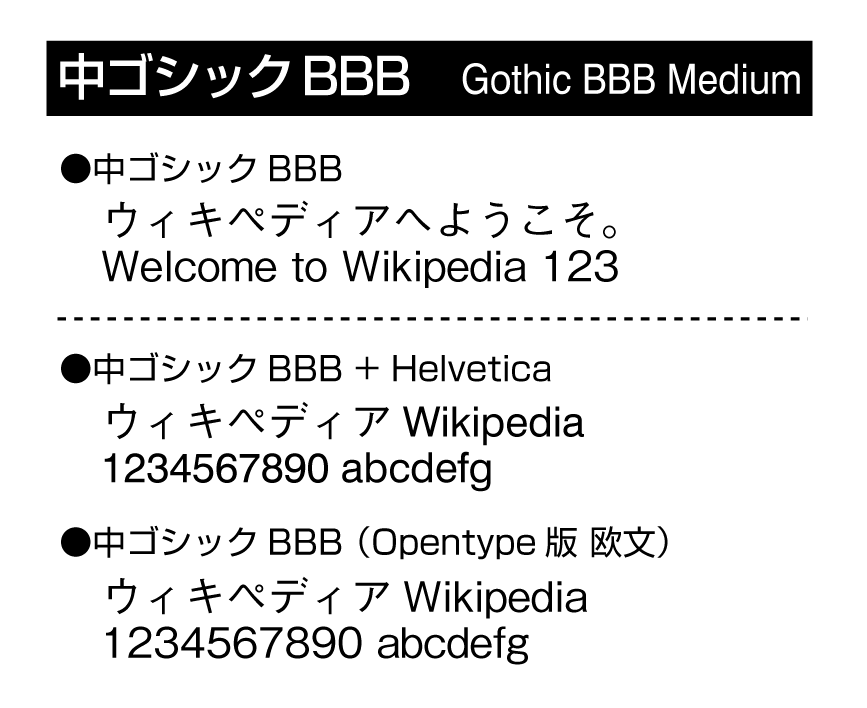 中ゴシックBBB（和文ゴシック体フォント）の書体見本